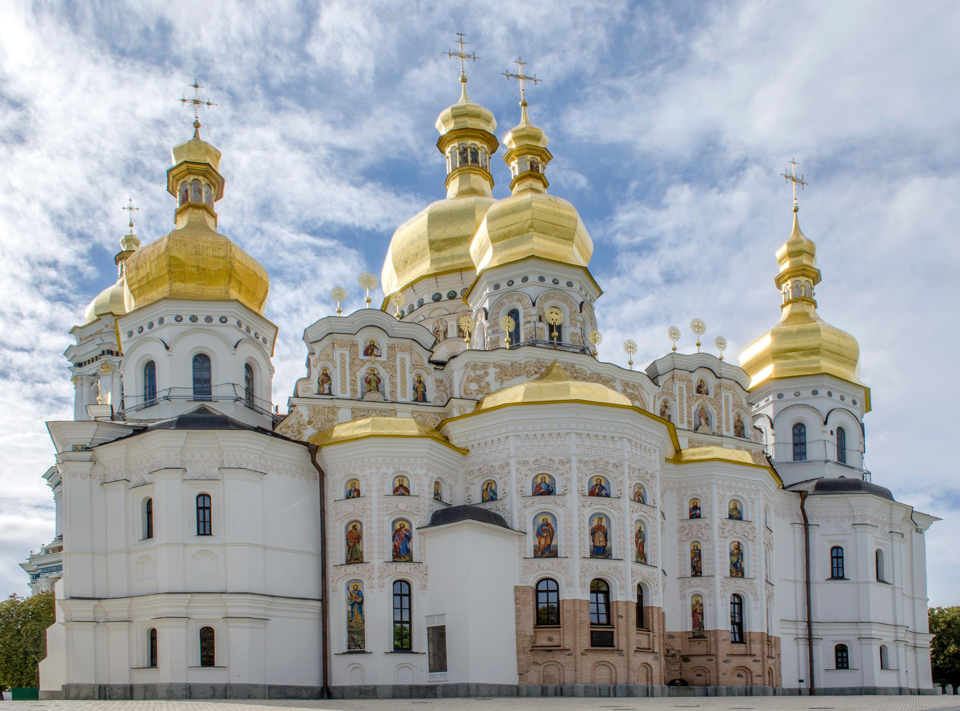 Комплекс Києво-Печерської лаври (Національний заповідник Києво-Печерська Лавра), Київ, Лаврська вул., 9, 15